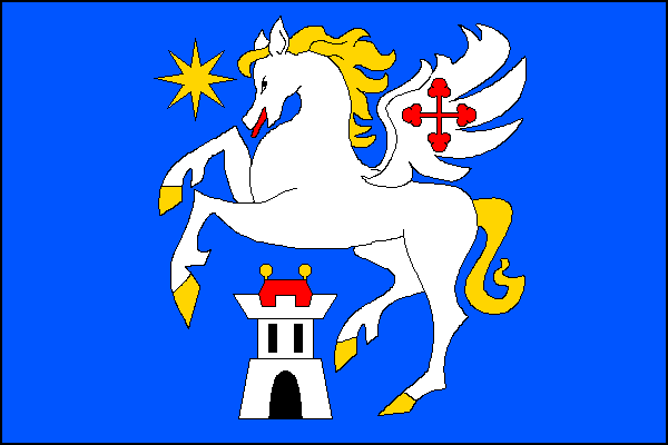 vlajka, Radešín, okres Žďár nad Sázavou